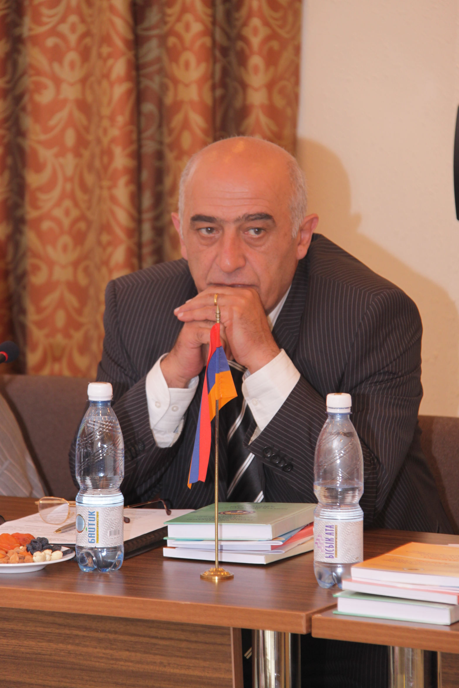 Эрнест Михайлович Согомонян, депутат Парламента Республики Армения первого и четвертого Созывов, председатель Социал-демократической партии "Гнчакян" Армении